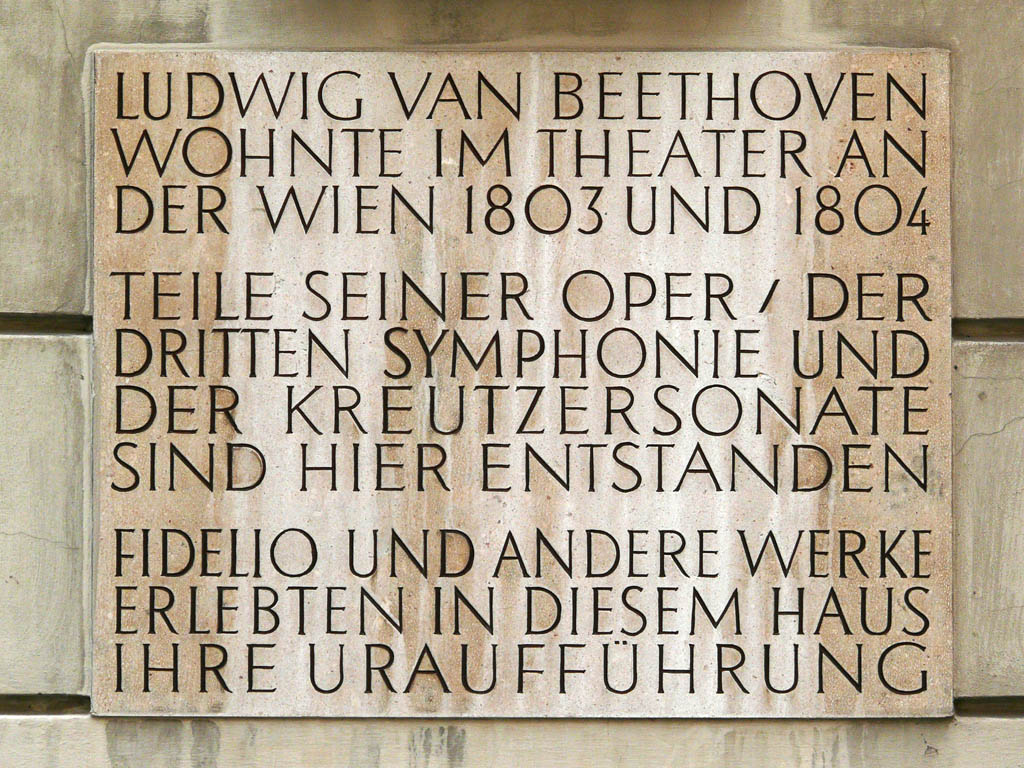 Beethoven Gedenktafel